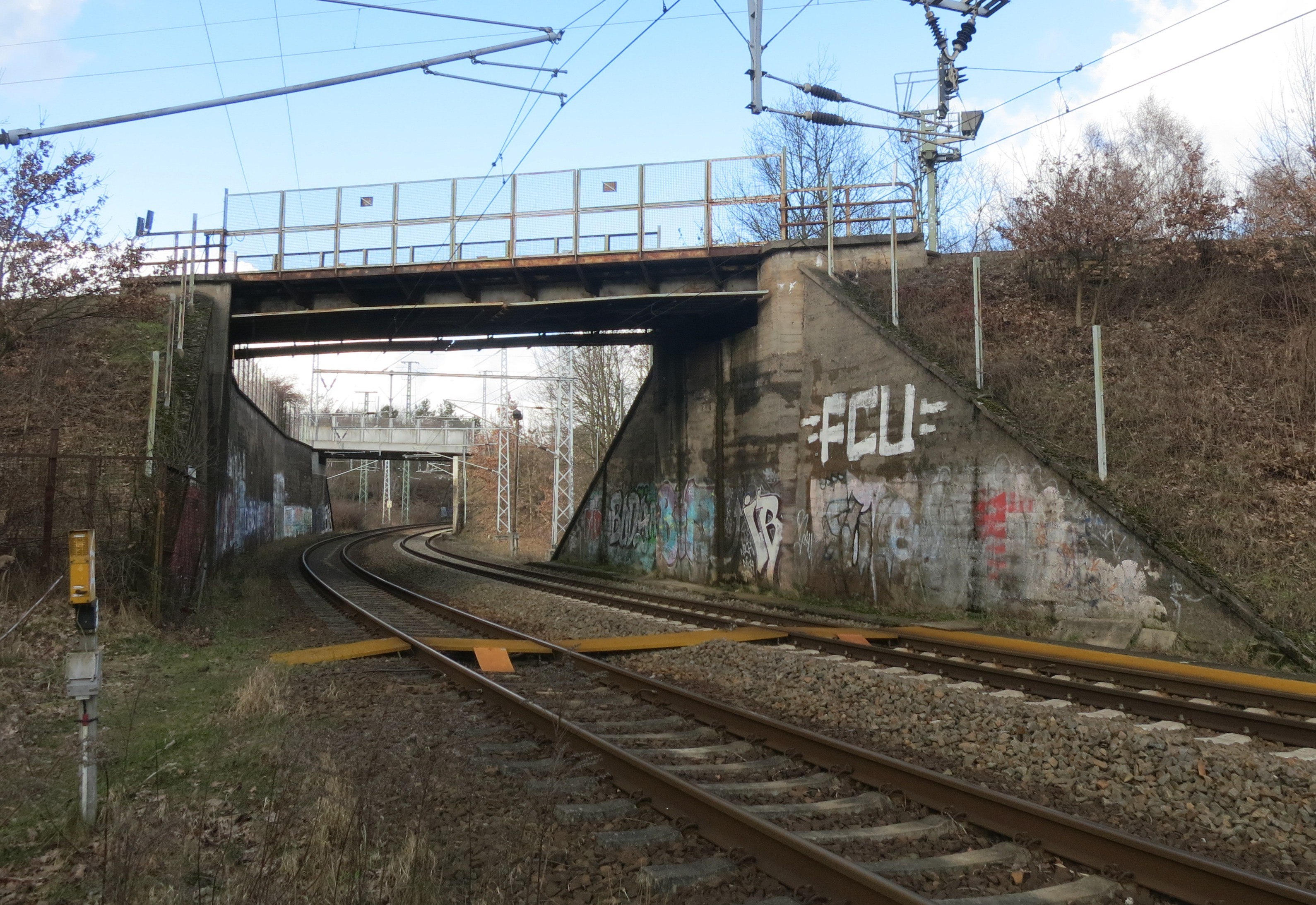 Brücke der Verbindungskurven vom Außenring über den Ferngleisen der Görlitzer Bahn am Grünauer Kreuz